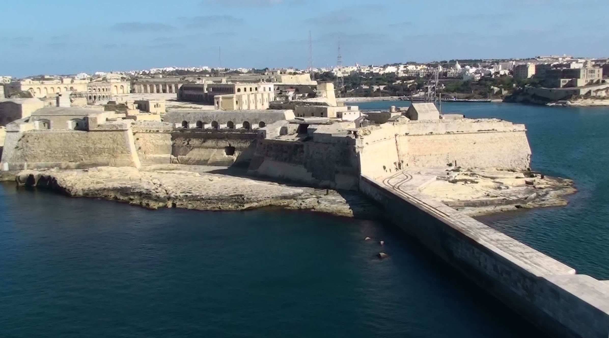 Exit port of La Valletta